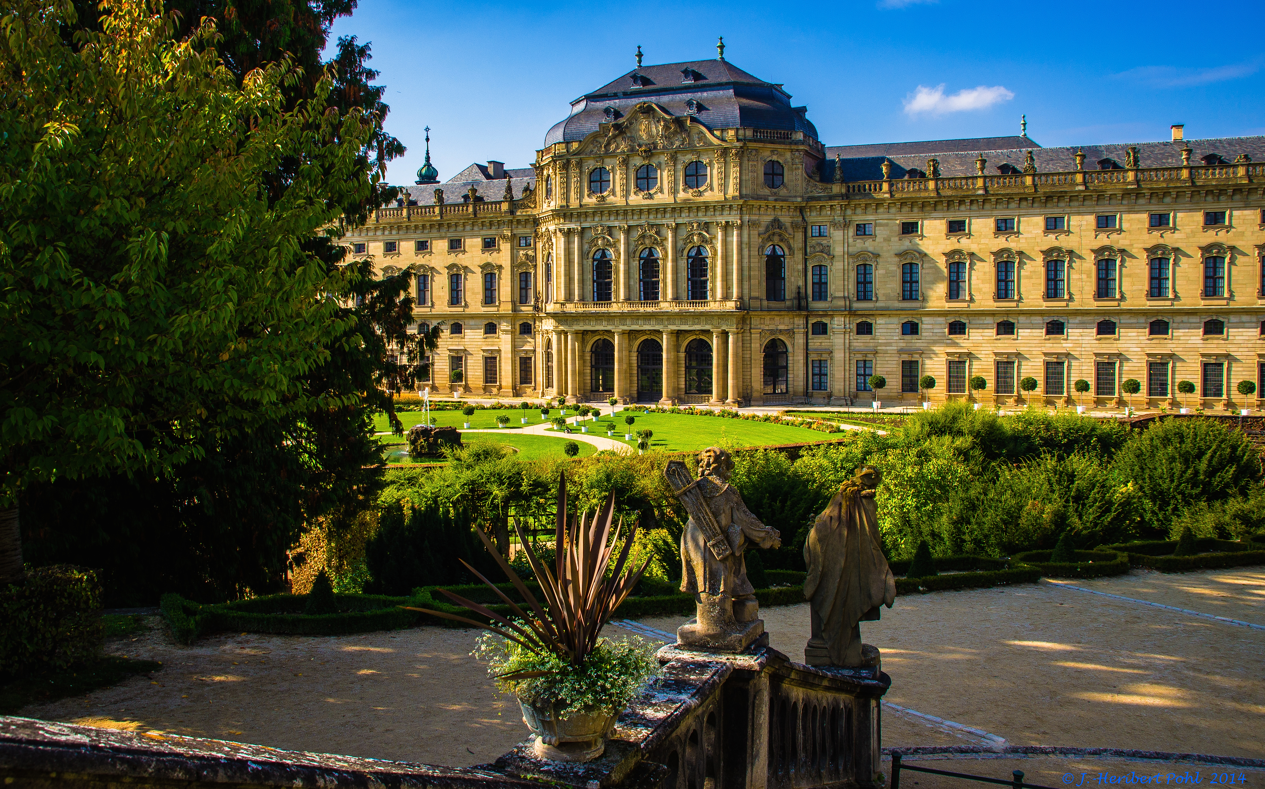 Die im Stil des Barocks gebaute Würzburger Residenz wurde zwischen 1719 und 1744 im Auftrage von Johann Philipp Franz von Schönborn errichtet. Der Baumeister war Balthasar Neumann. Sie war der Sitz der Würzburger Fürstbischöfe. Im europäischen Kontext gilt es als einer der bedeutendsten Residenzbauten des Spätbarocks und steht mit einer Reihe mit Schlössern wie Schönbrunn (Wien) und Versailles. Seit 1881 gehört es zum Weltkulturerbe. Built in the style of Baroque Würzburg Residence was built in 1719-1744 by order of Johann Philipp Franz von Schönborn. The architect was Balthasar Neumann. It was the seat of the Würzburg prince-bishops. In the European context it is considered one of the most important Residenzbauten the late Baroque and communicates with a series of locks such as Schönbrunn (Vienna) and Versailles. Since 1881, a World Heritage Site.